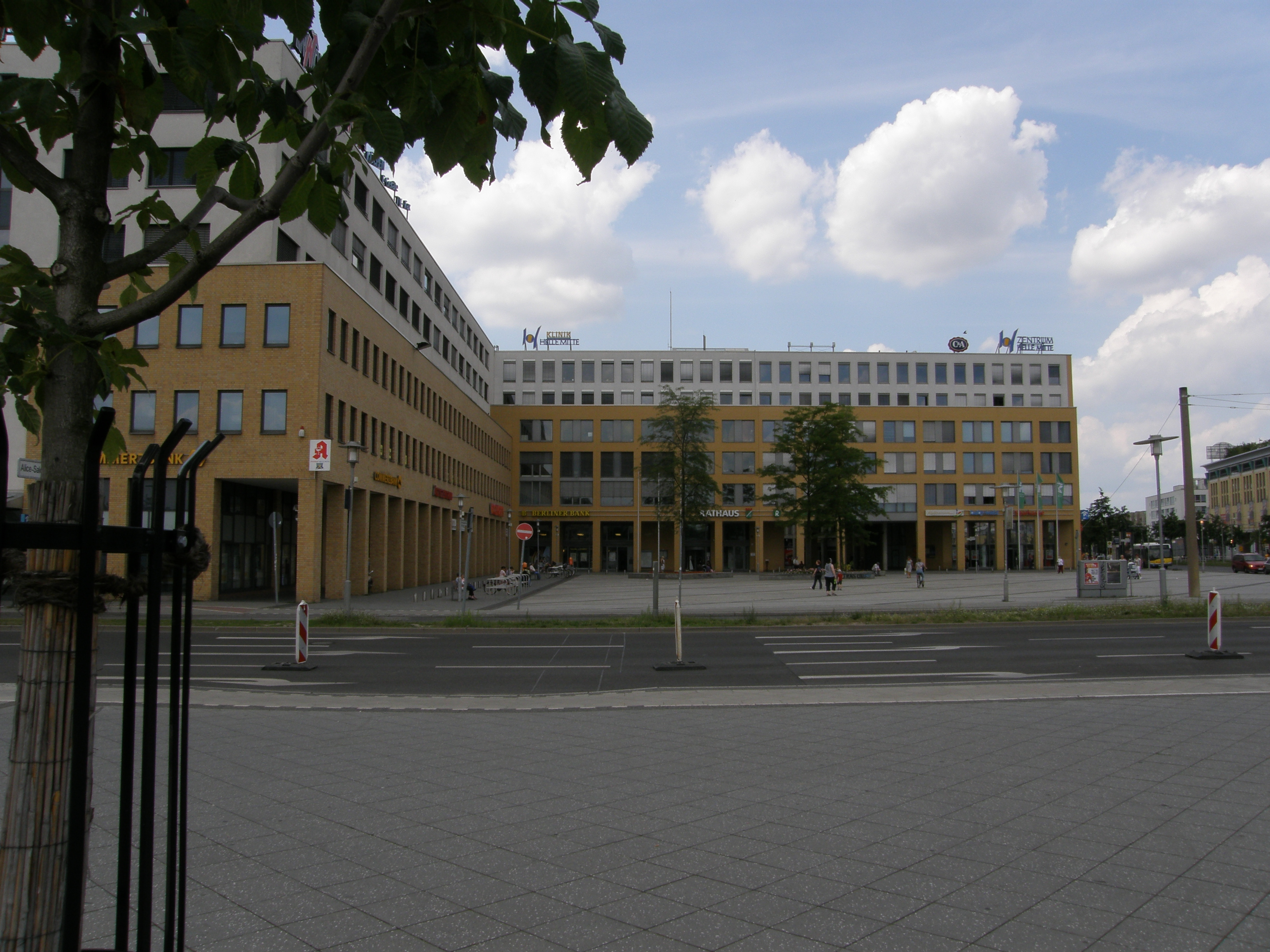 Berlin-Hellersdorf, Helle Mitte / Alice-Salomon-Platz/ Stendaler Str / Hellersdorfer Str; Rathaus